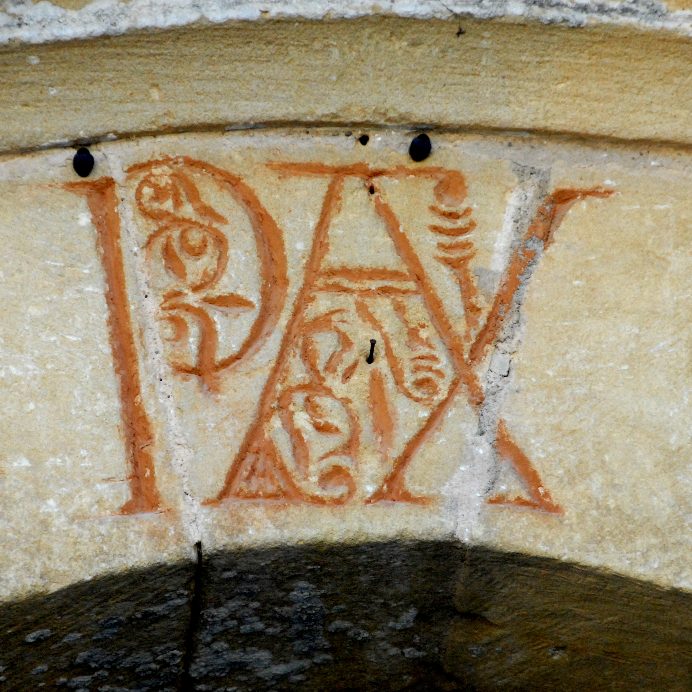 Abtei Cadouin, Ansicht von SO